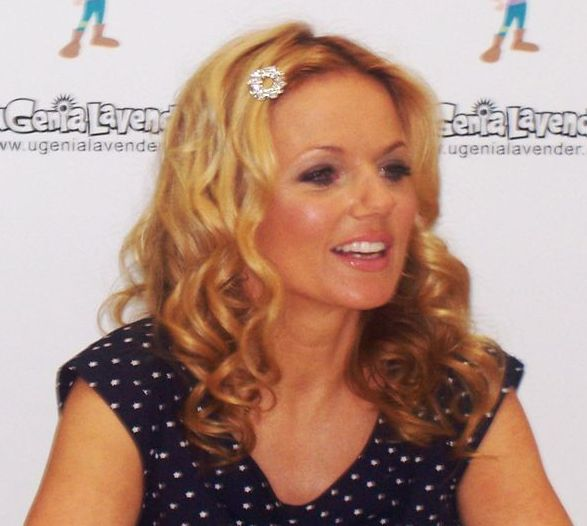 Geri Halliwell gyermekkönyvét dedikálja a Milton Keynes-i ASDA áruházban 2008. május 3-án.